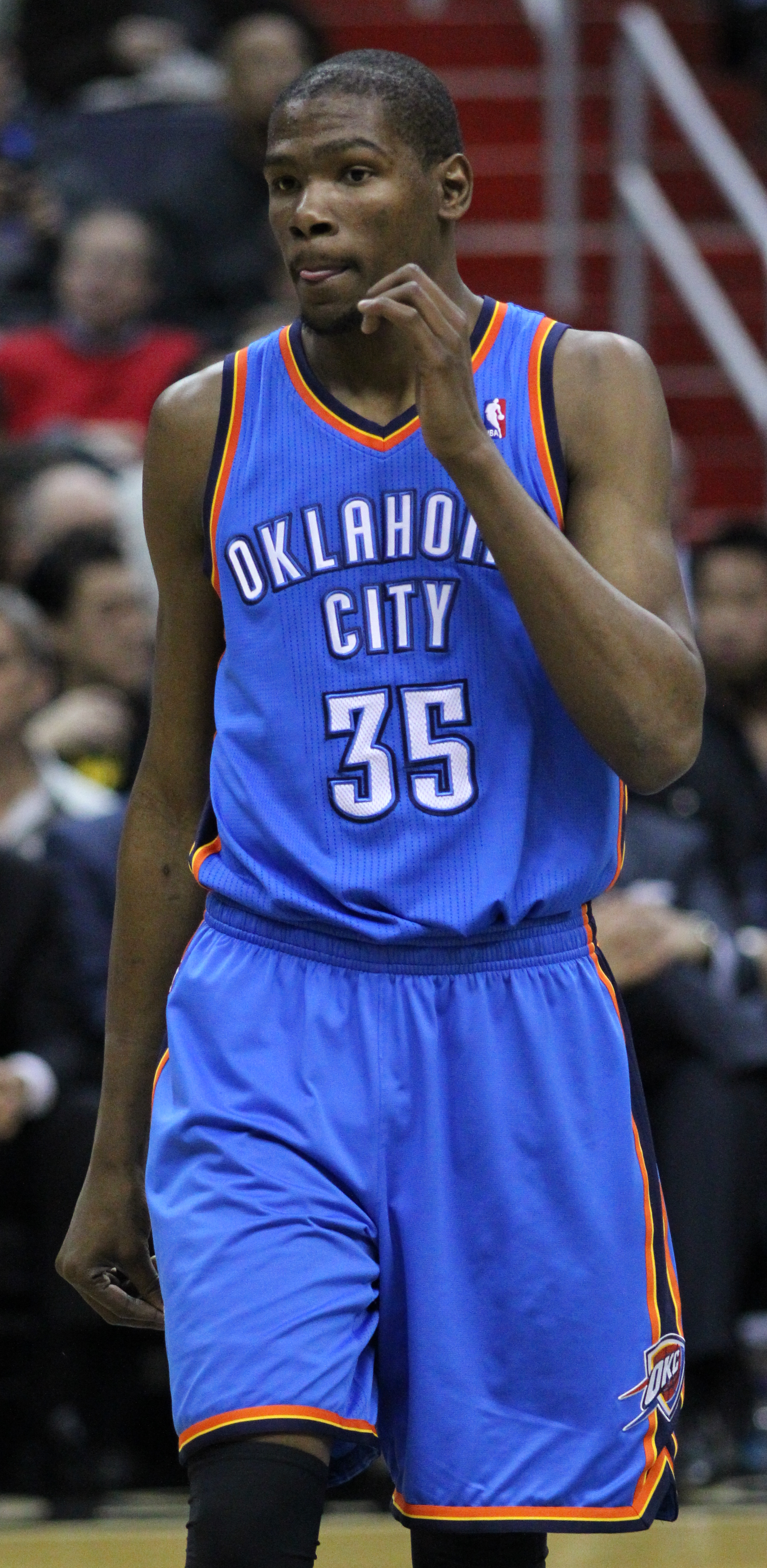 Wizards v/s Thunder 03/14/11